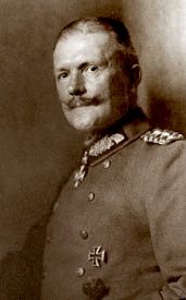 Adalbert von Falk (1859-1930)